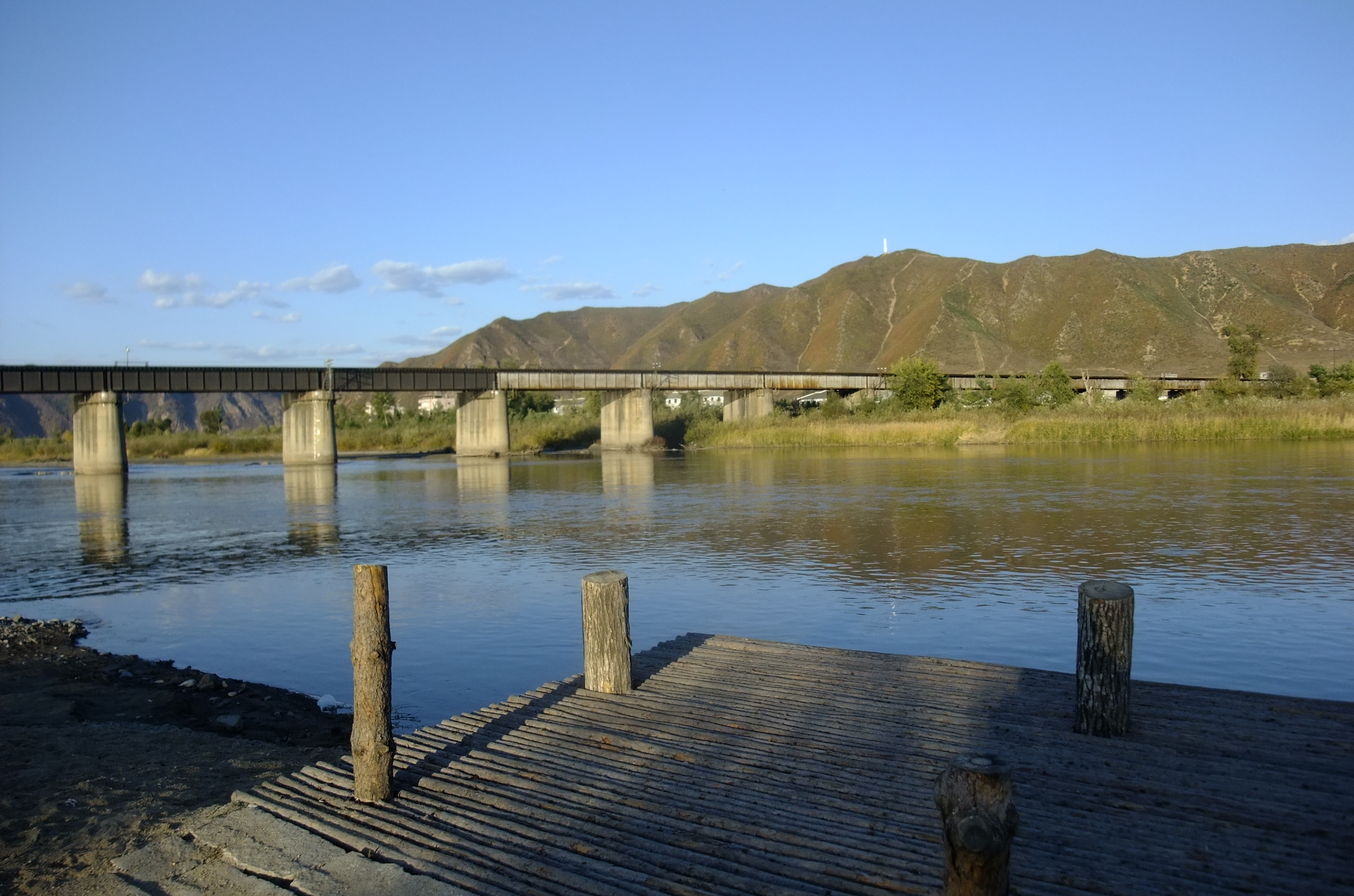 从图们江渡口看铁路桥